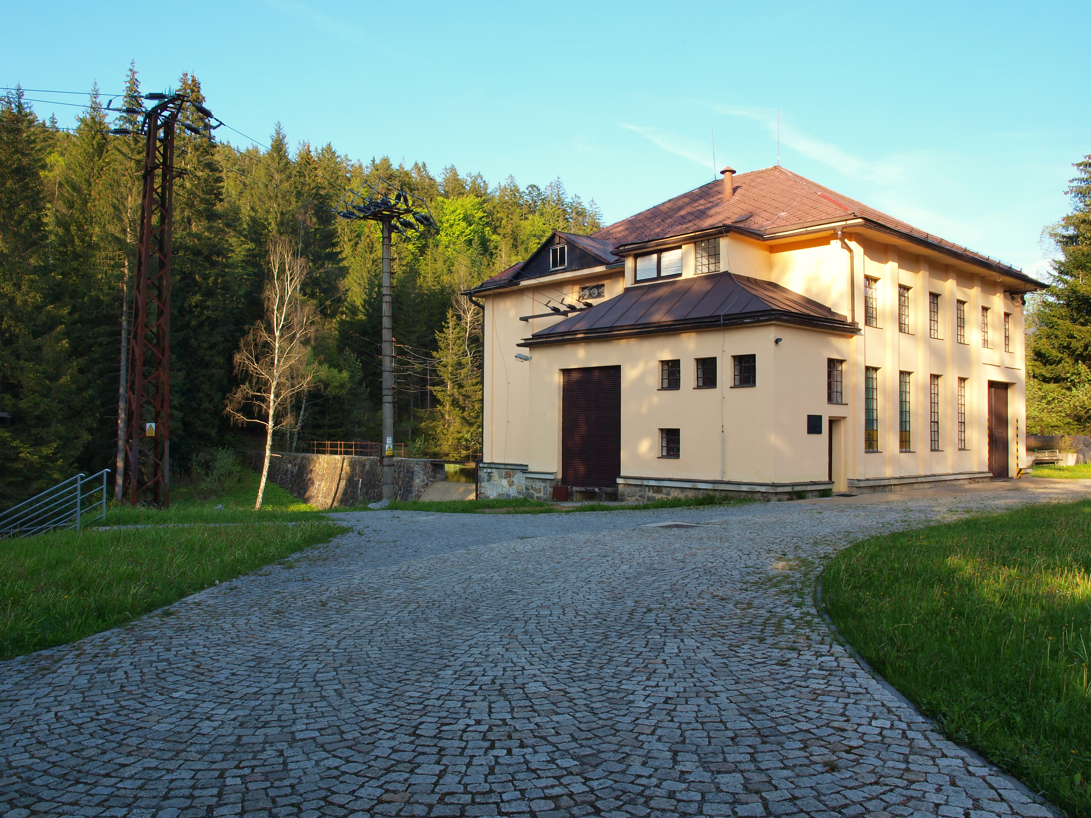 Česky: Vodní přečerpávací elektrárna pod Černým jezerem na Šumavě je napájena vodou z ledovcového jezera nad Železnou Rudou. Nachází se v údolí řeky Úhlavy